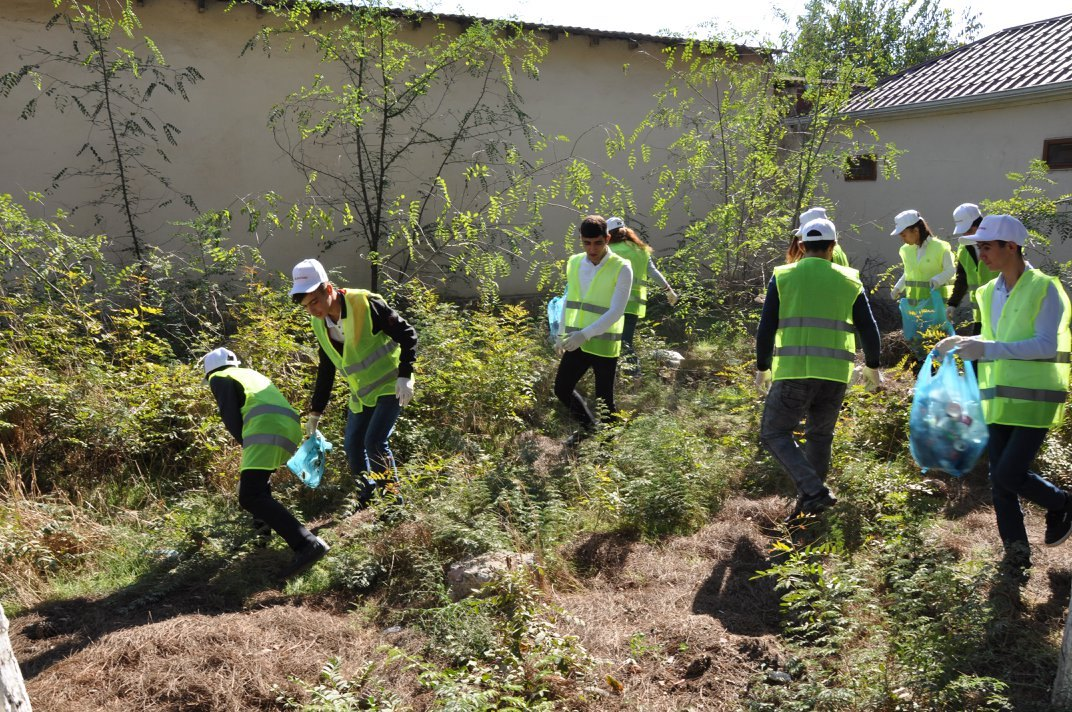 Könüllü fəaliyyəti